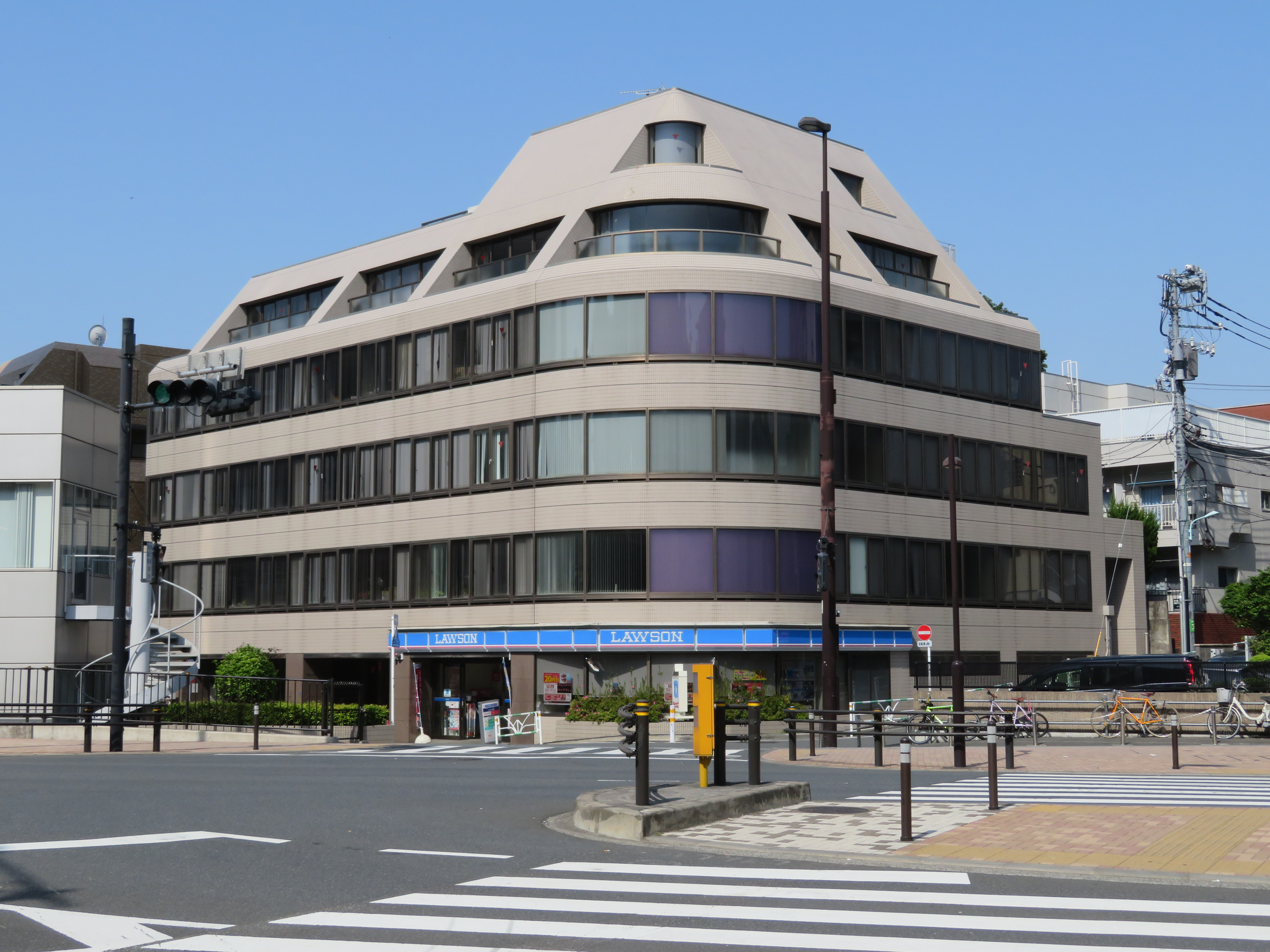 東京都渋谷区にある元代々木サンサンビル Canon PowerShot SX720 HS